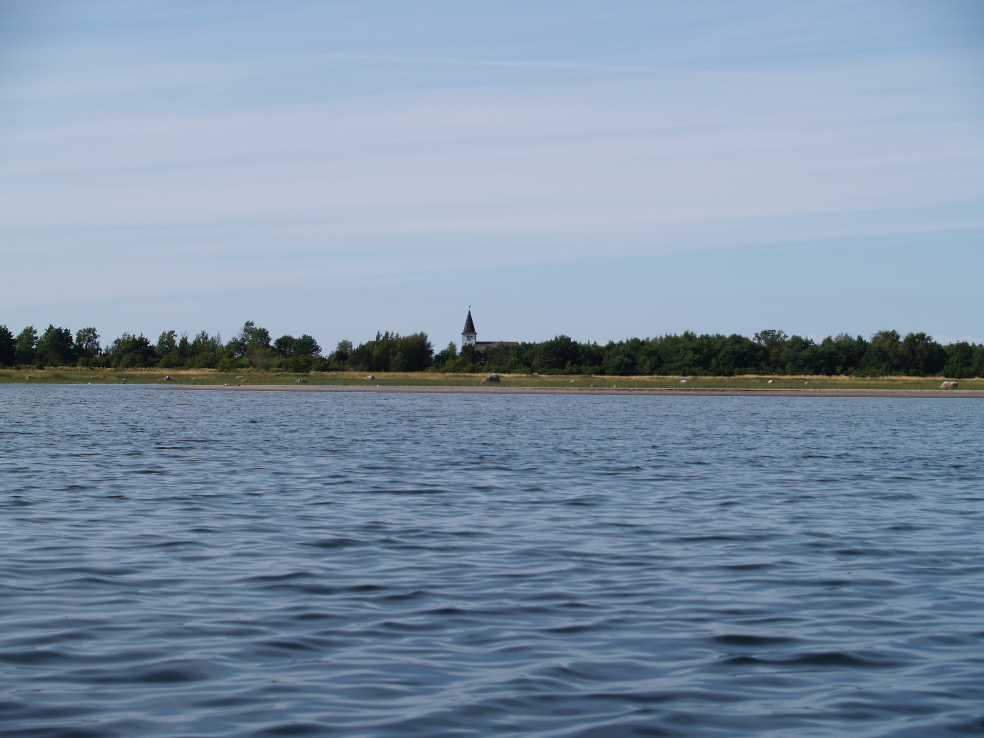 Prangli kirik merelt